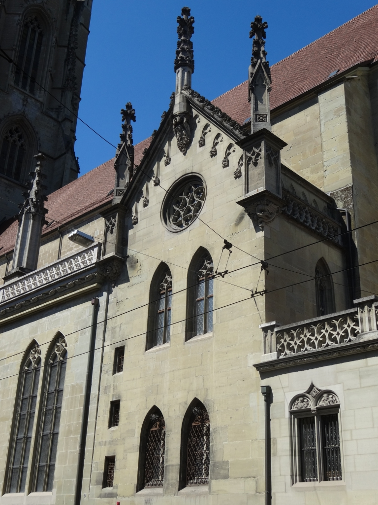 Cathédrale St-Nicolas de Fribourg (Suisse). Sacristie.